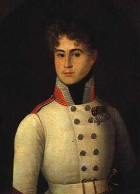 Портрет Сергея Николаевича Тургенева